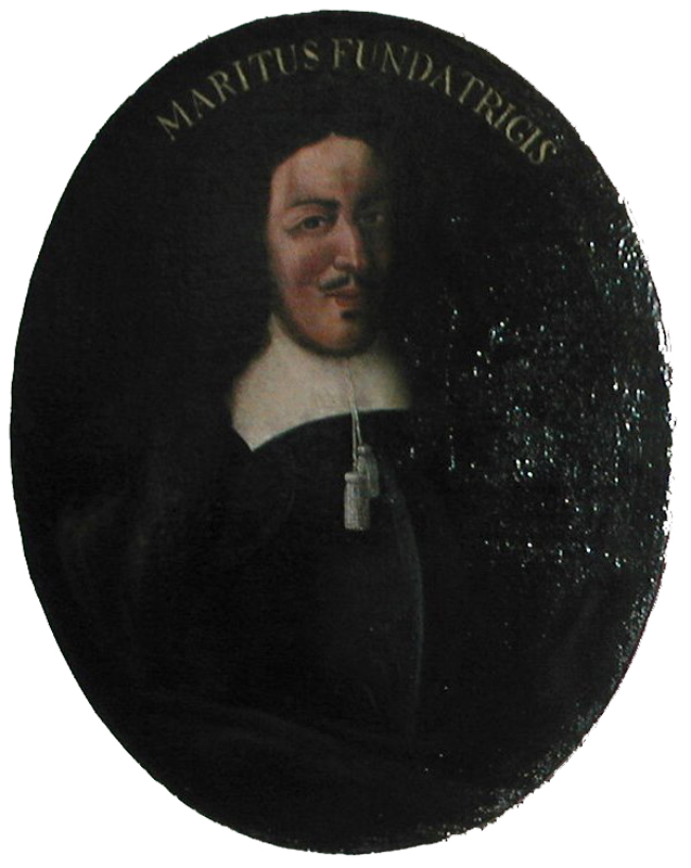 Julius Hendrik van Saksen-Lauenburg.